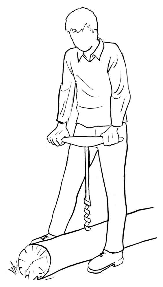 Utilisation de la tarière auteur : Taveneaux 8 février 2006 à 12:15 (CET)